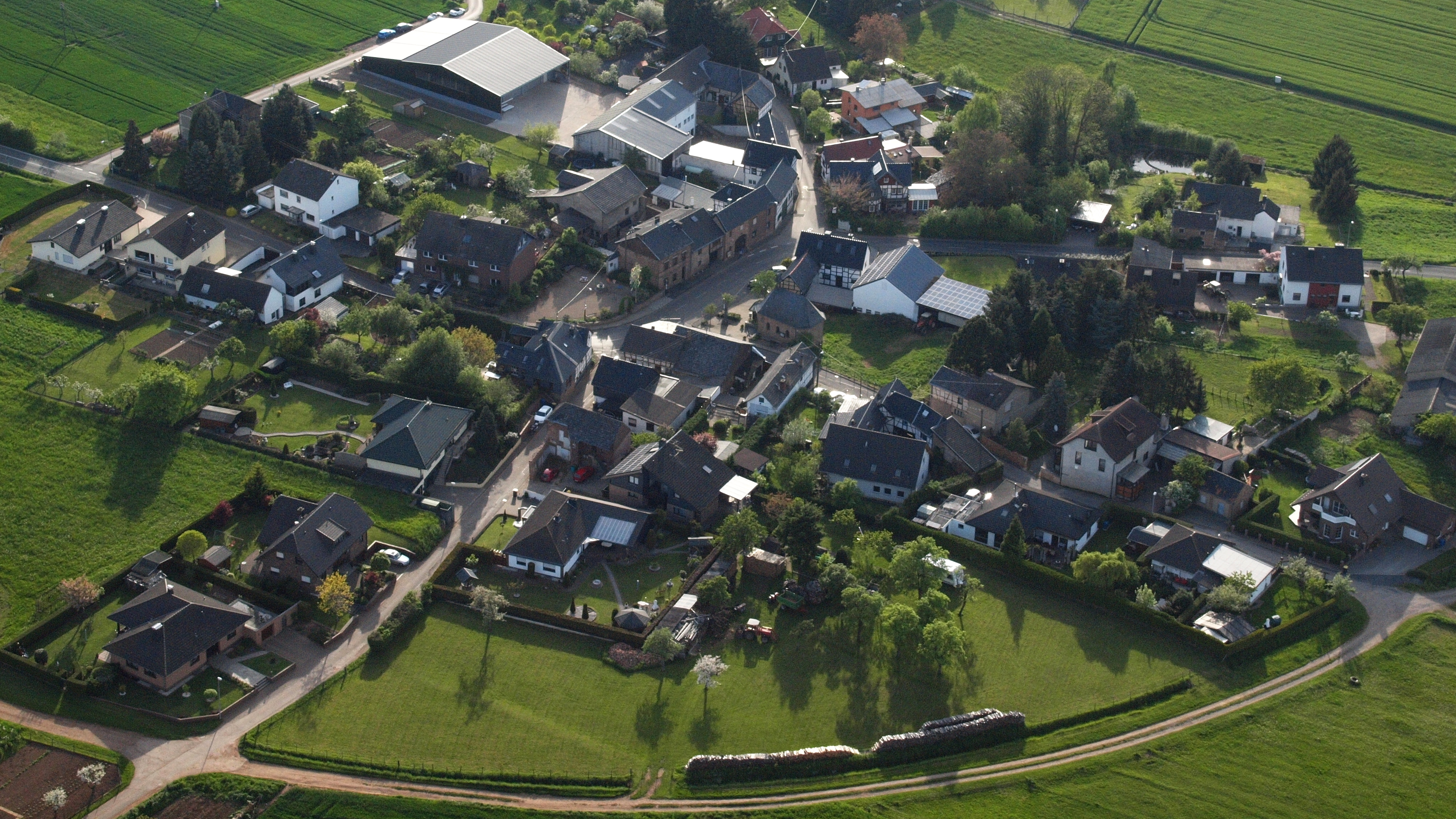 Rißdorf, Luftaufnahme (2015)